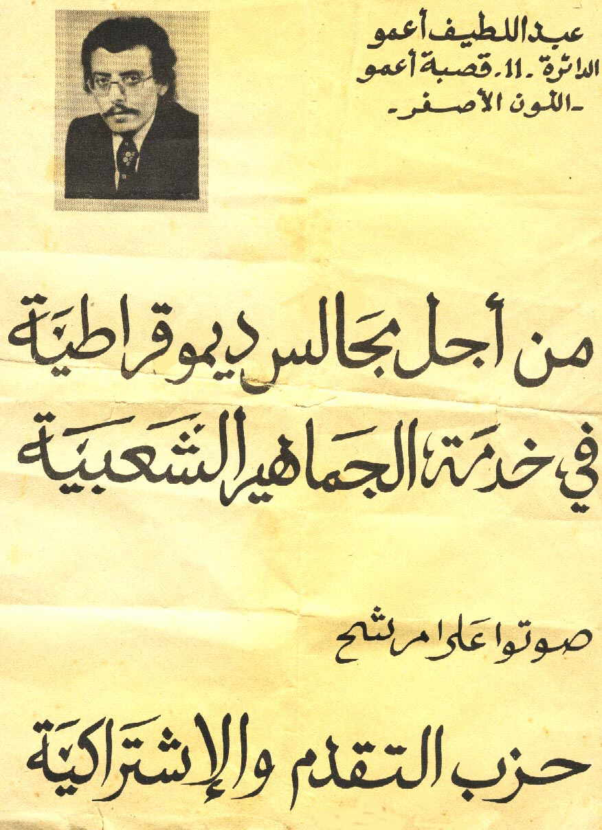 أول الانتخابات الجماعية التي شارك فيها عبد اللطيف أعمو بتيزنيت باسم حزب التقدم والاشتراكية في سنة 1976